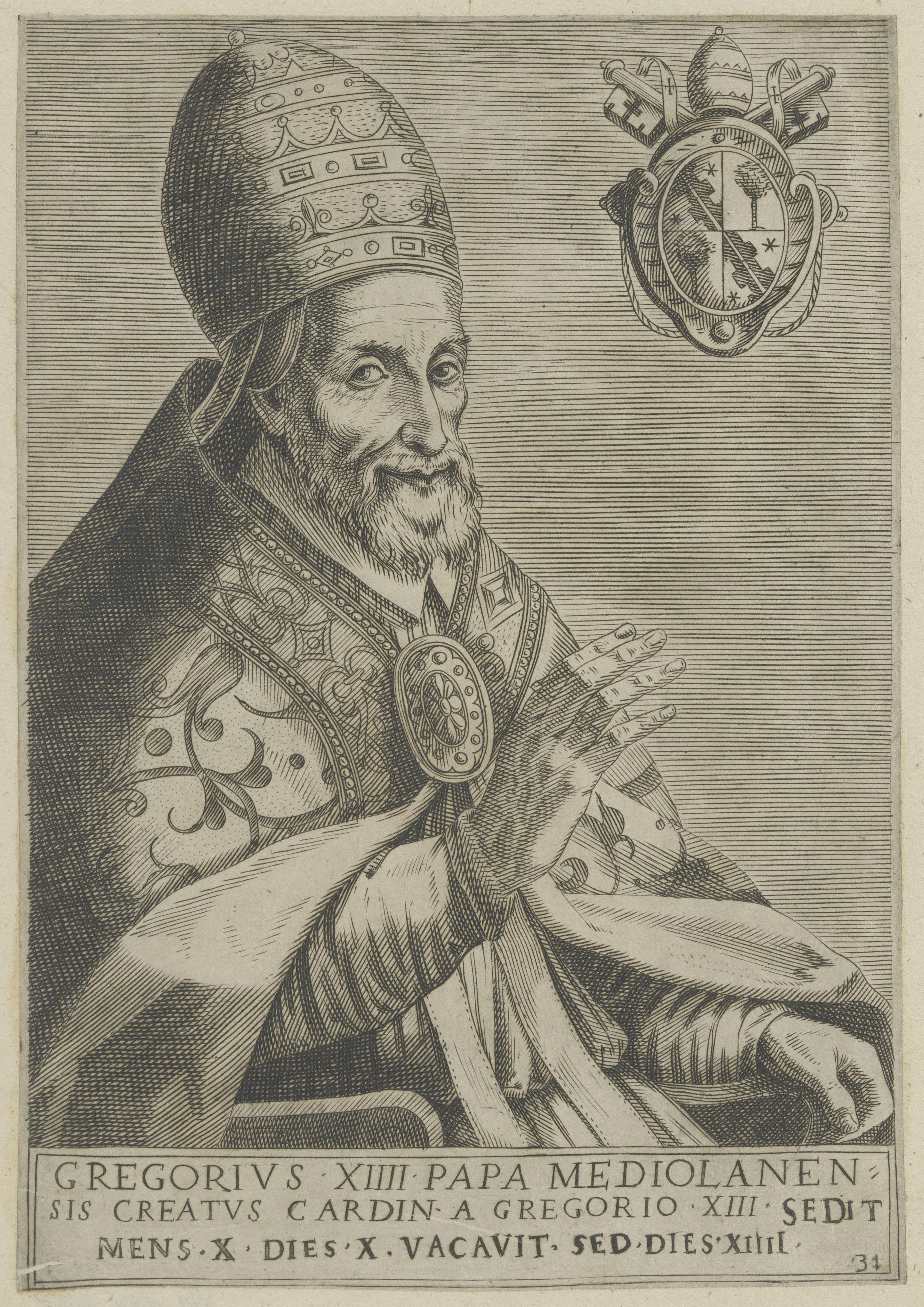 Papst Gregor XIV Kunstsammlungen der Veste Coburg Kupferstich, 235 x 164 mm (Blatt) Coburg, Kunstsammlungen der Veste Coburg, Inventar-Nr. XIII,153,273, Mappe 20, Passepartout 37 Laut Quelle aus: Galle, Philips, PONTIFICIUM MAXIMU. NUMER. XXVII EFFIGIES..., Porträtwerk, 1572, Antwerpen (was aber nicht stimmten kann, da Gregor XIV erst 1590–1591 Papst war und seine Amtsdauer und Wappen im Bild angegeben sind)